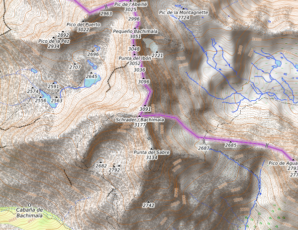 carte réalisée sur umap This map may be incomplete, and may contain errors. Don't rely solely on it for navigation.